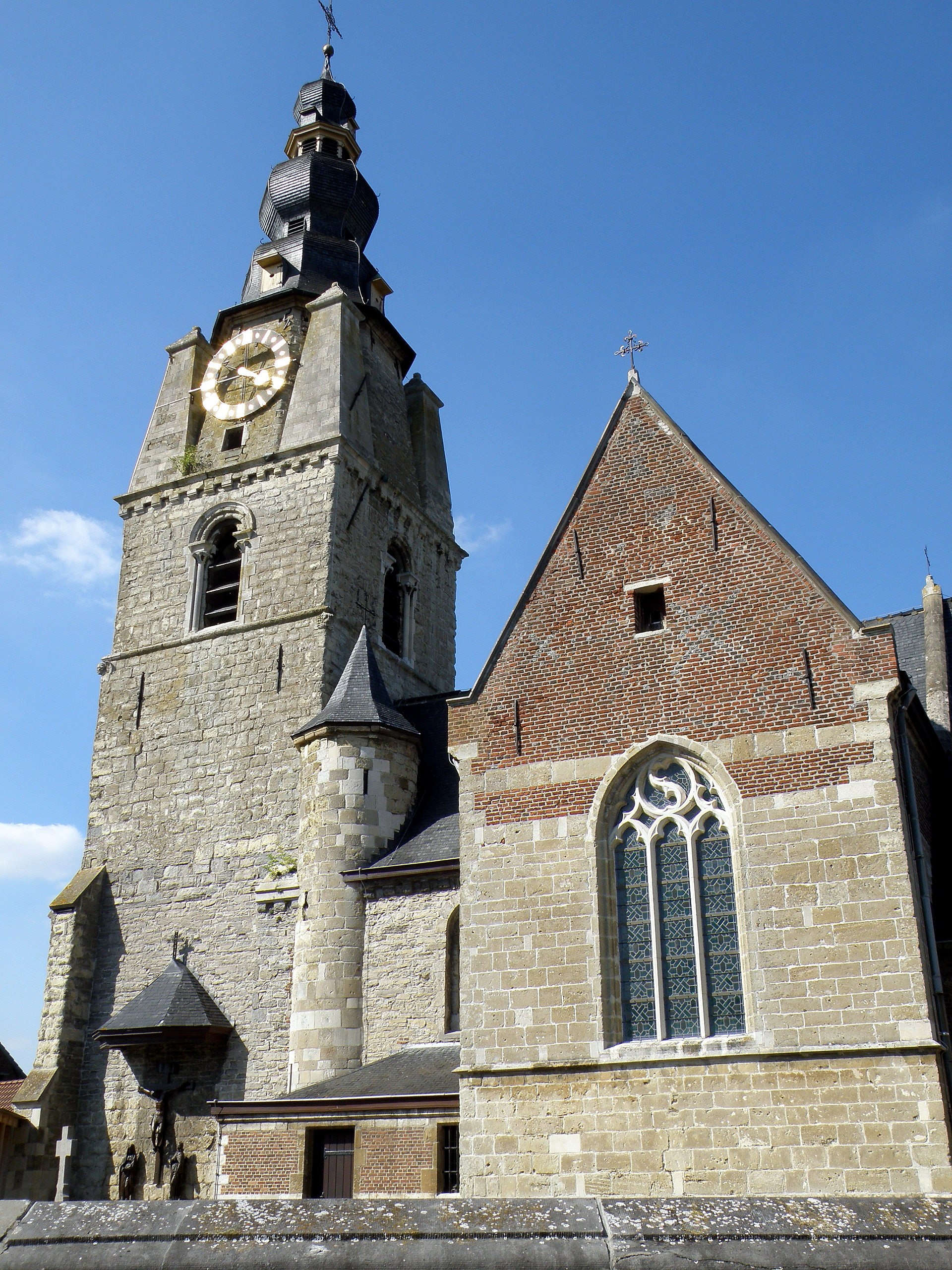 Mespelare (deelgem. van Dendermonde, prov. Oost-Vlaanderen, België). Sint-Aldegondiskerk.